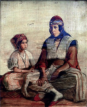 Ouerda et sa Fille (complete painting)